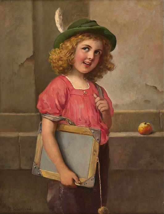 Schulmädchen, Oil on cardboard, 50 × 38 cm